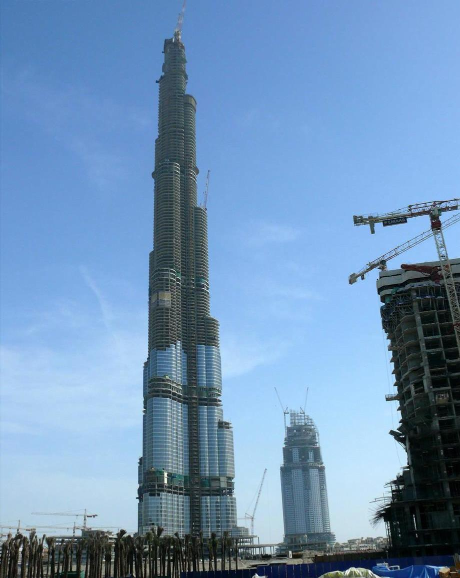 Burj Dubai 02/12/2007